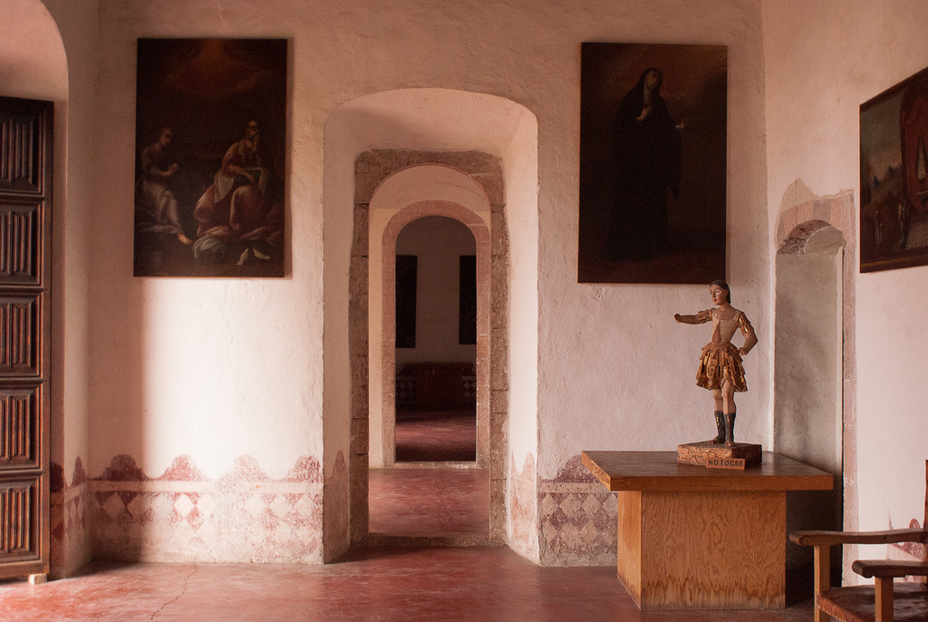 Museo Religioso de Actopan, Hidalgo, México